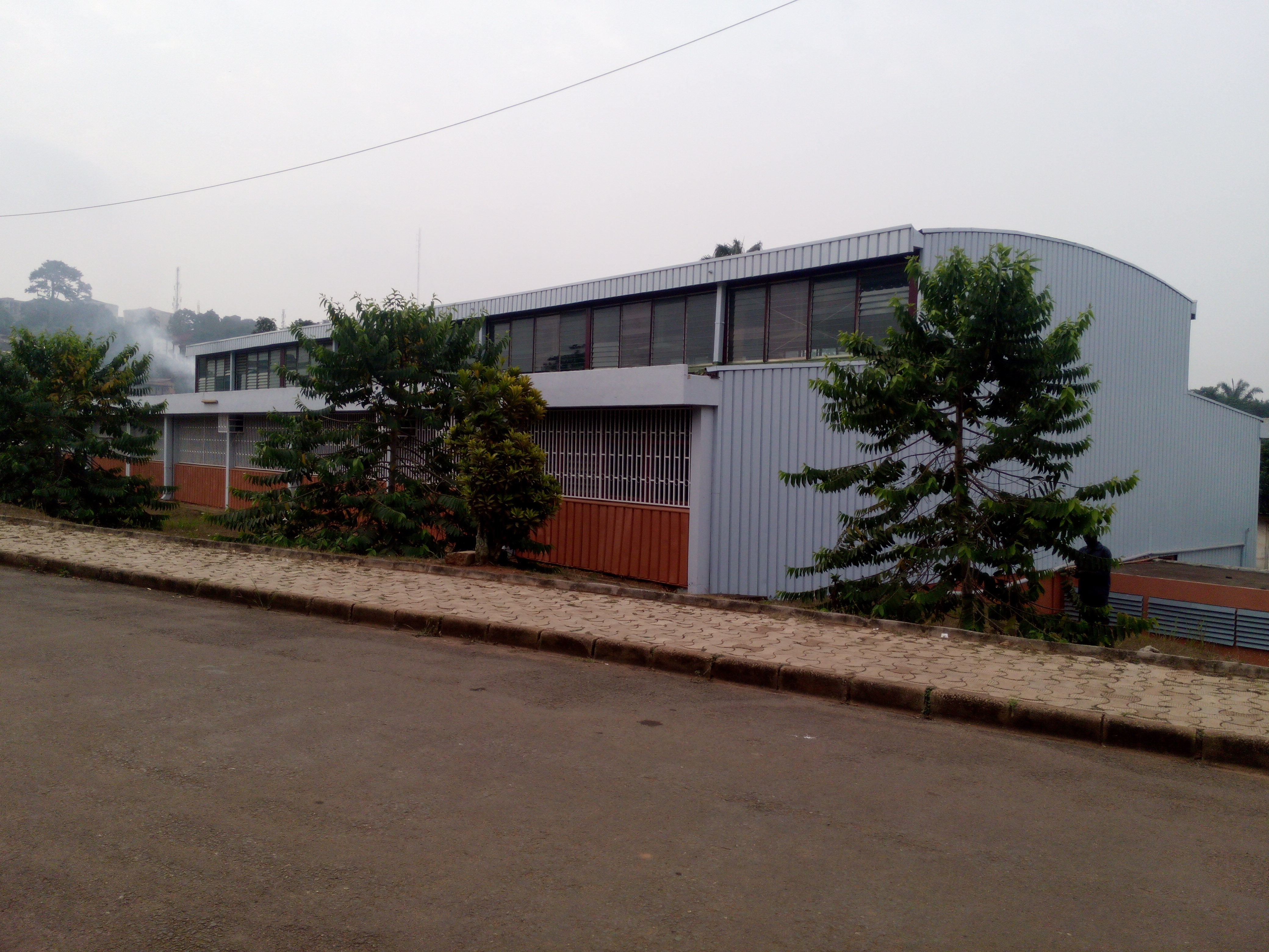 cette image représente l'atelier du département du génie mécanique de l'ENSP-Yaoundé-Cameroun